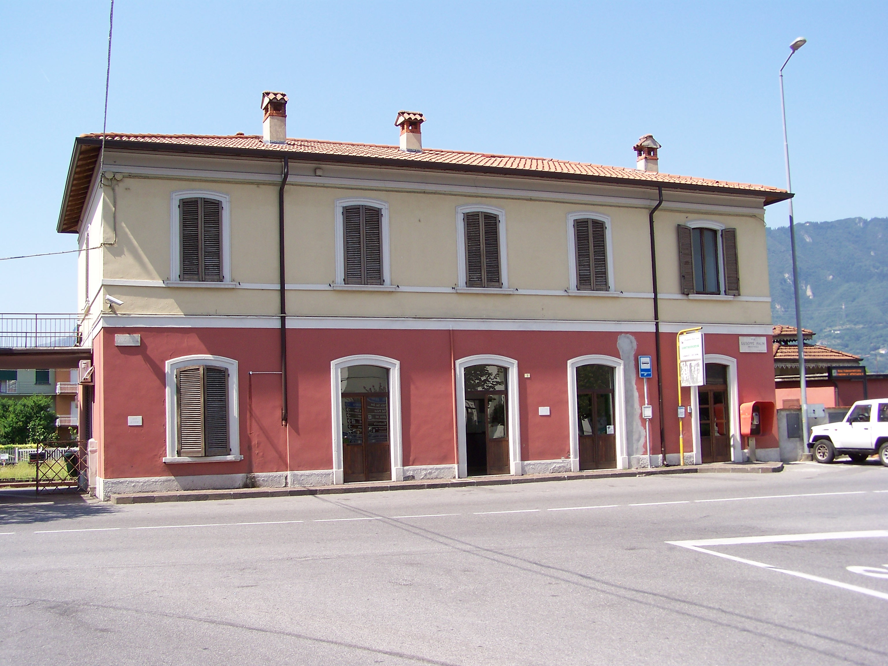 Lato campagna del fabbricato viaggiatori della stazione di Pisogne della ferrovia Brescia-Iseo-Edolo. Agosto 2009.